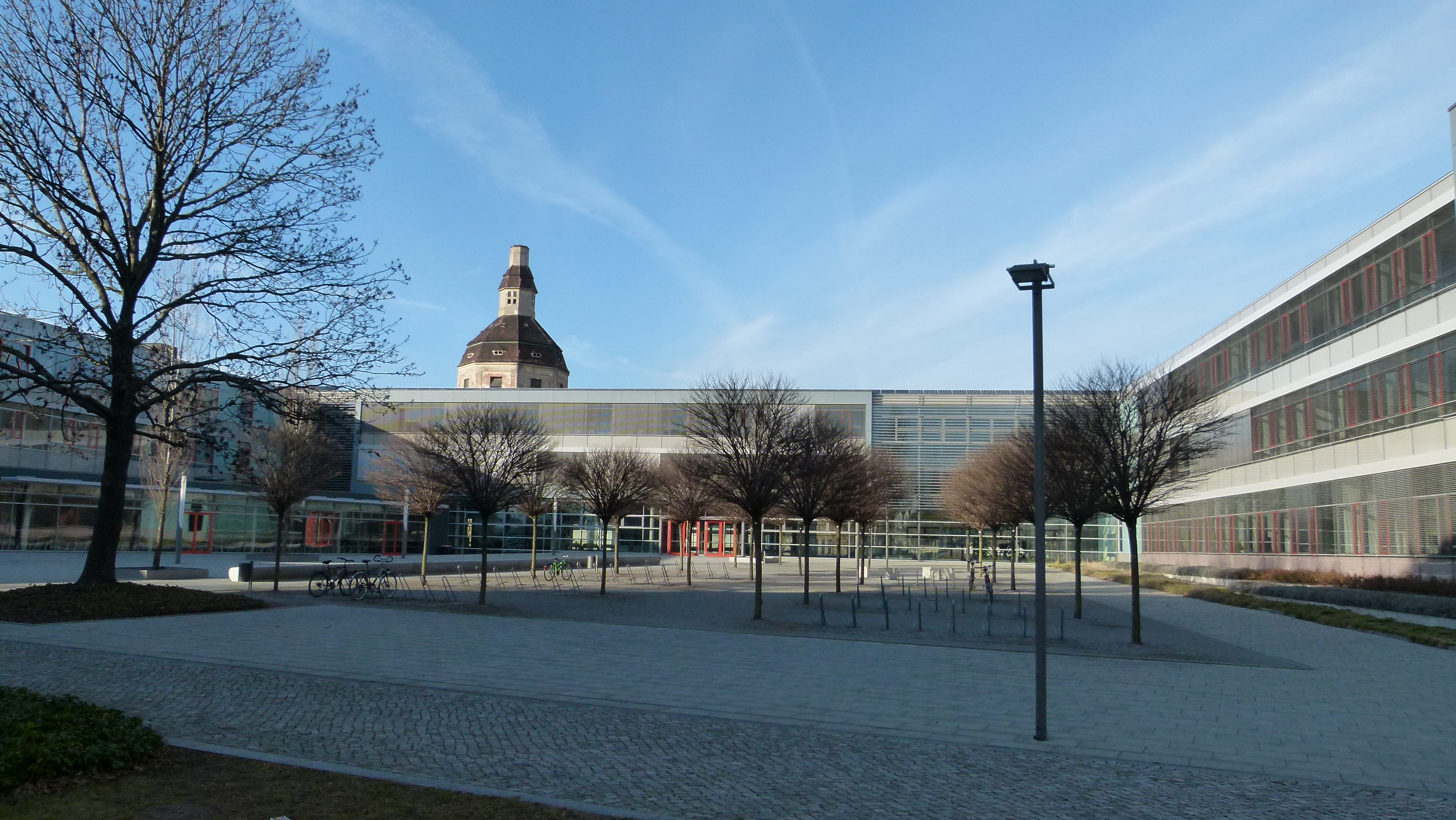 Sportschulzentrum Dresden, Friedrichstadt,Messering 2a